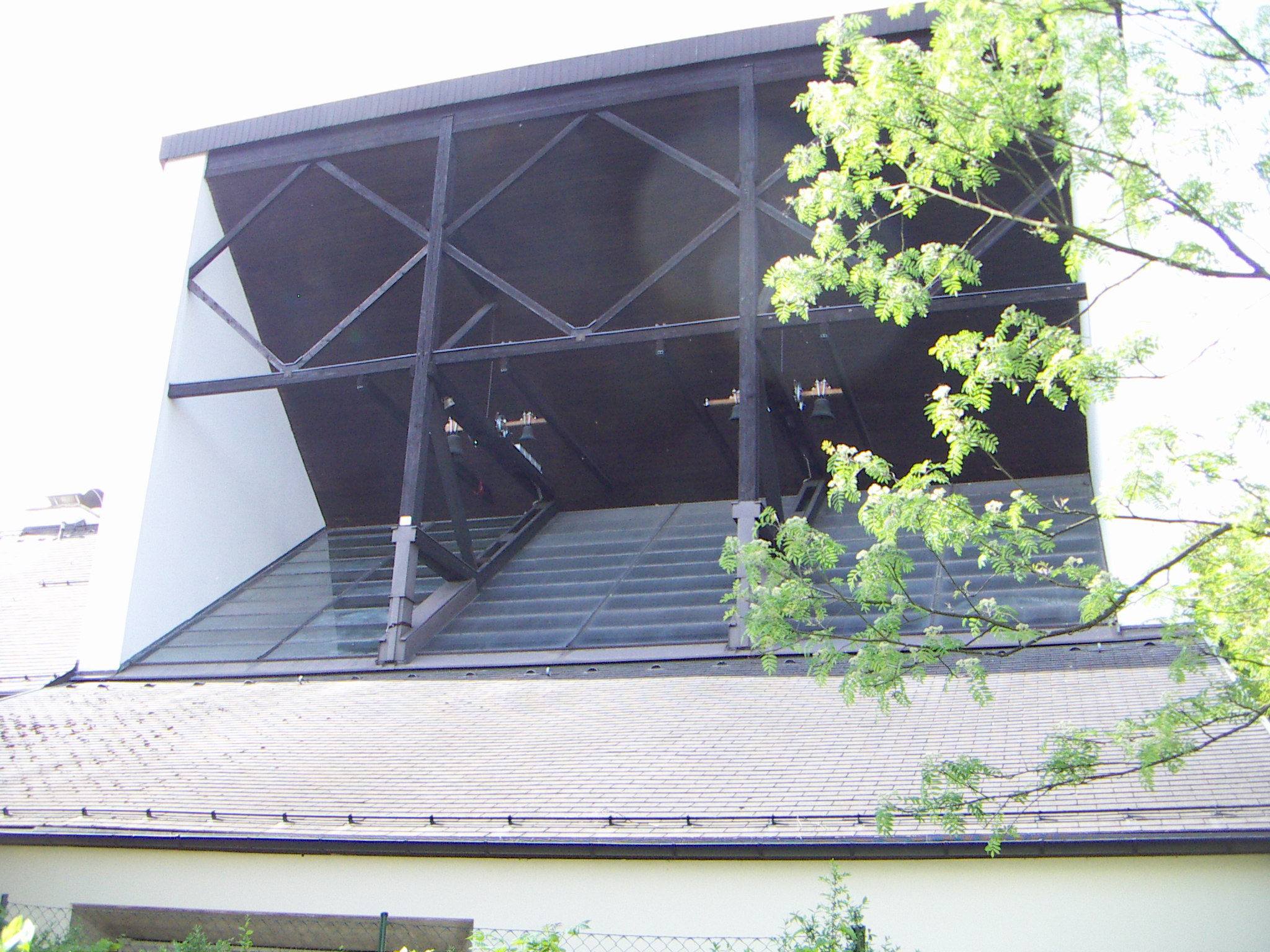 Parscher Pfarrkirche Zum Kostbaren Blut, halbseitig vollverglastes Dach über dem Altarraum, darüber Glockenstuhl, darüber ein gegenläufiges Pultdach